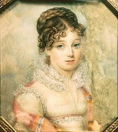 Dorota Lubomirska (1807-1832)